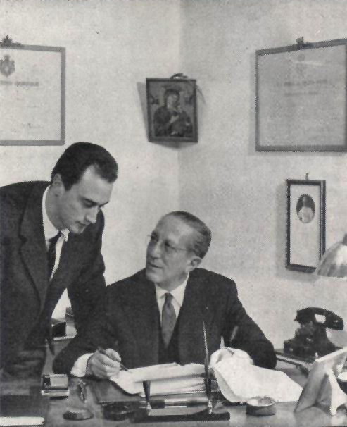 Ritratto Fotografico